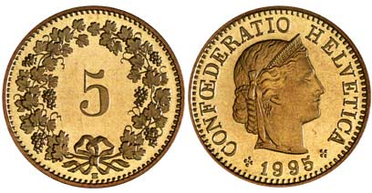 0.05 CHF 1995 / Fünfrappen